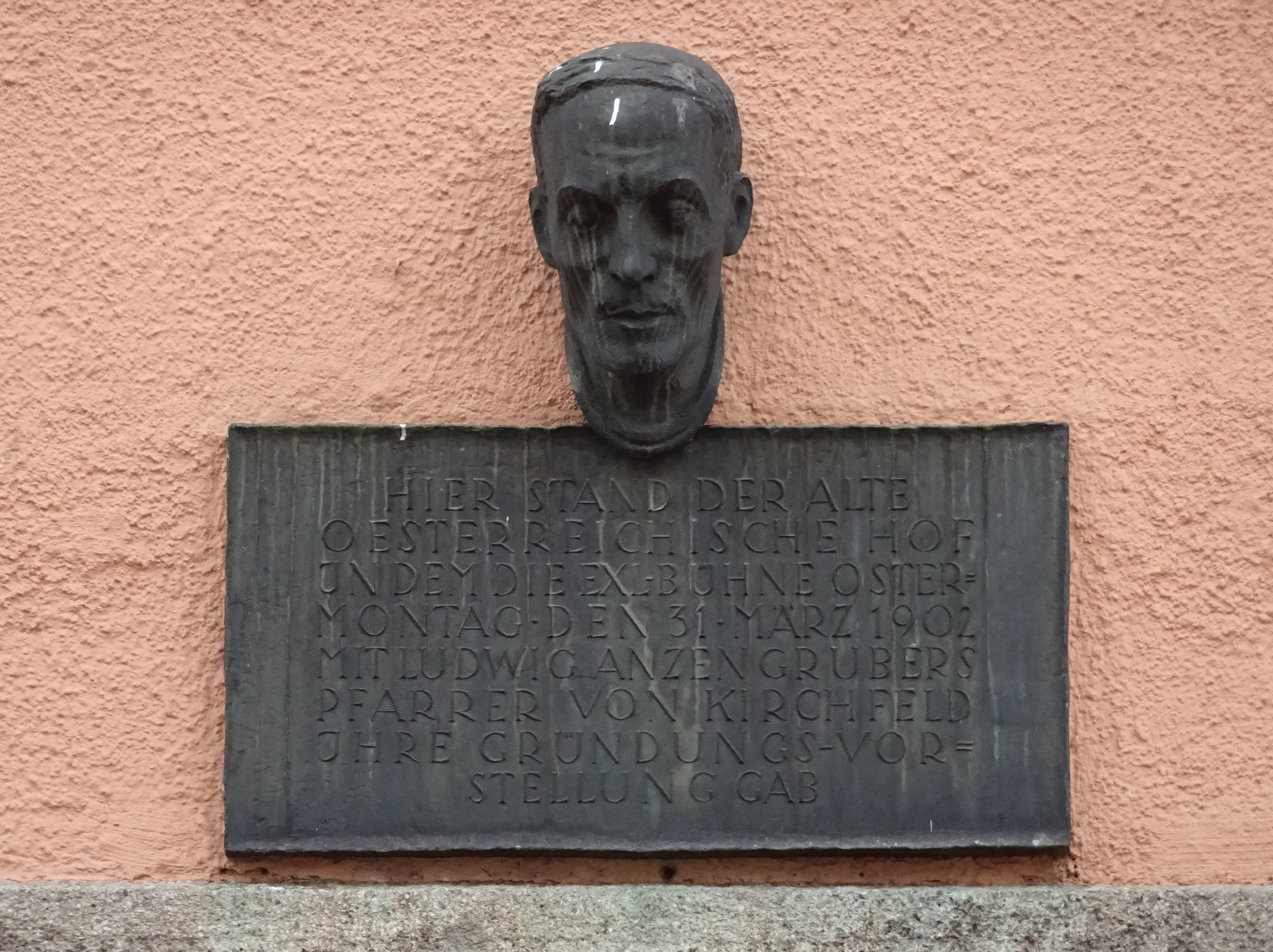 Gedenktafel zur Erinnerung an die Gründungsvorstellung der Exl-Bühne am 31. März 1902 am ehemaligen Österreichischen Hof, Andreas-Hofer-Str. 47, Innsbruck-Wilten